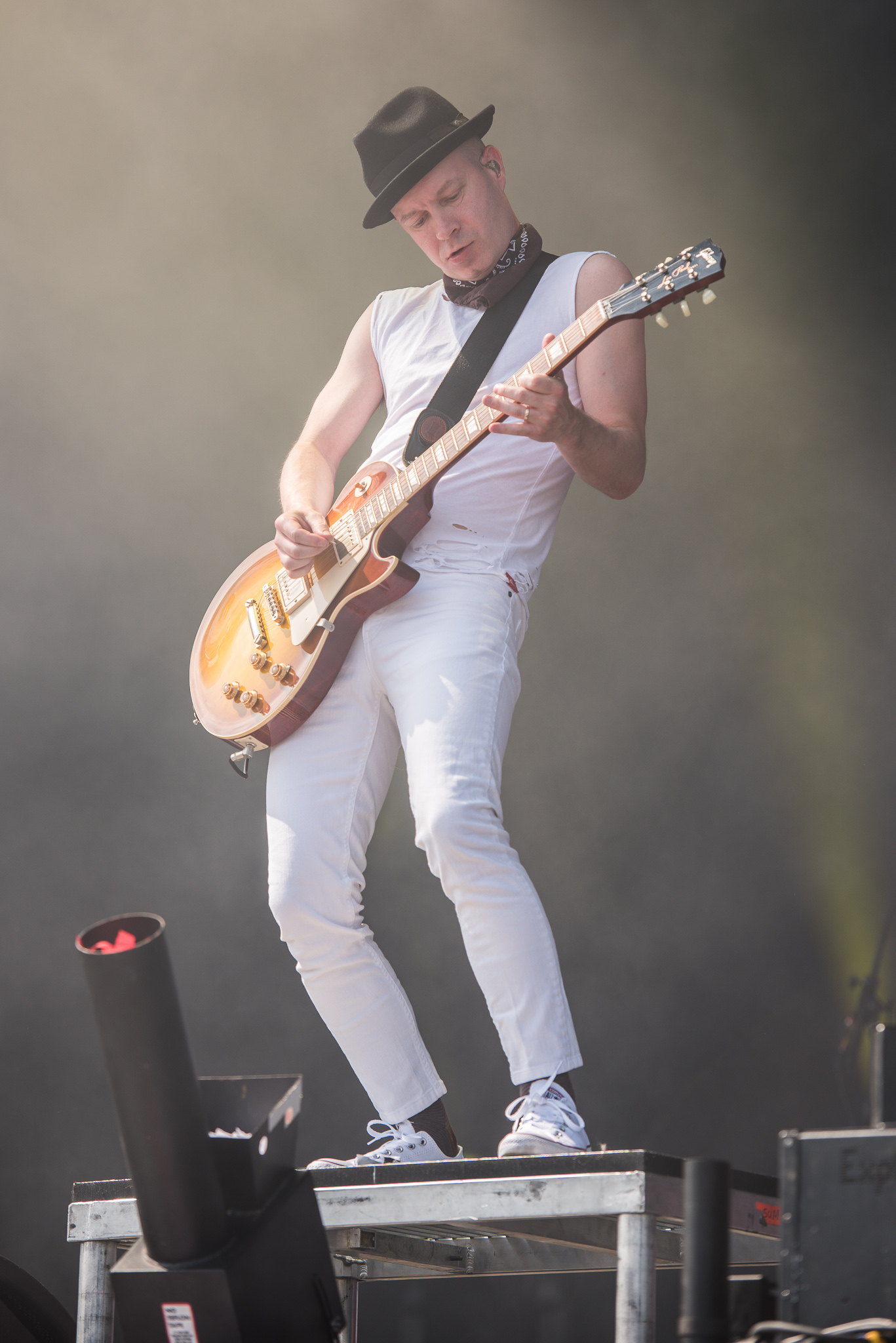 ARGO-Konzerte,Konzert,Livekonzert,Livemusik,Musik,RiP,Rock im Park 2017,Sum 41,Tom Thacker,Zeppelin Stage